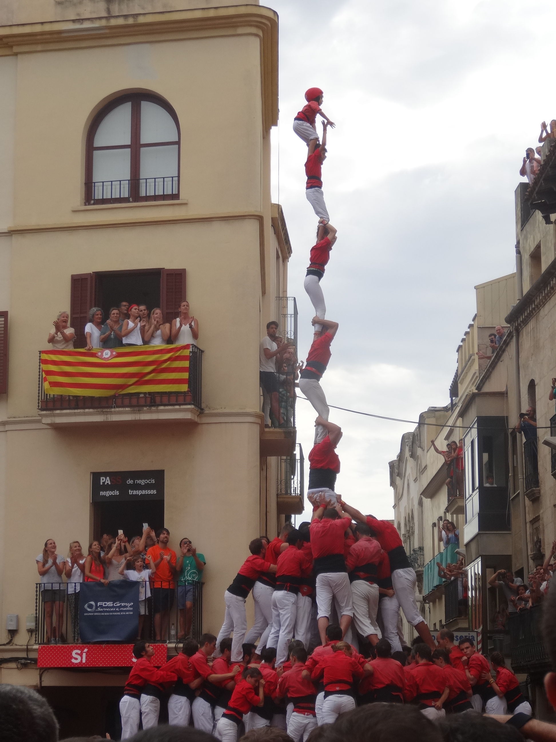 Diada de Sant Fèlix 2017. Joves Pde8fm (carregat)